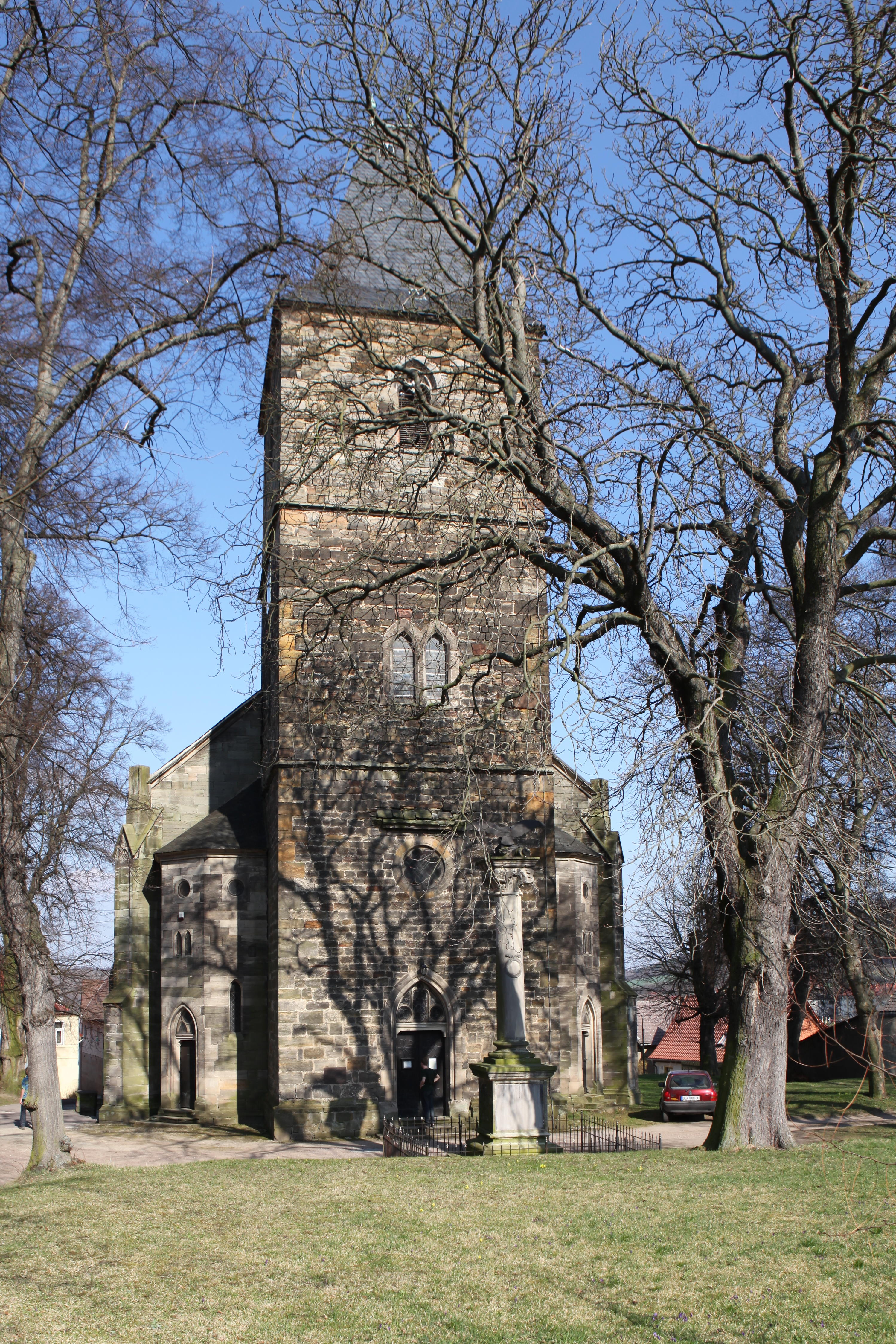 Maria-Magdalenen-Kirche in Bad Bibra in Sachsen-Anhalt